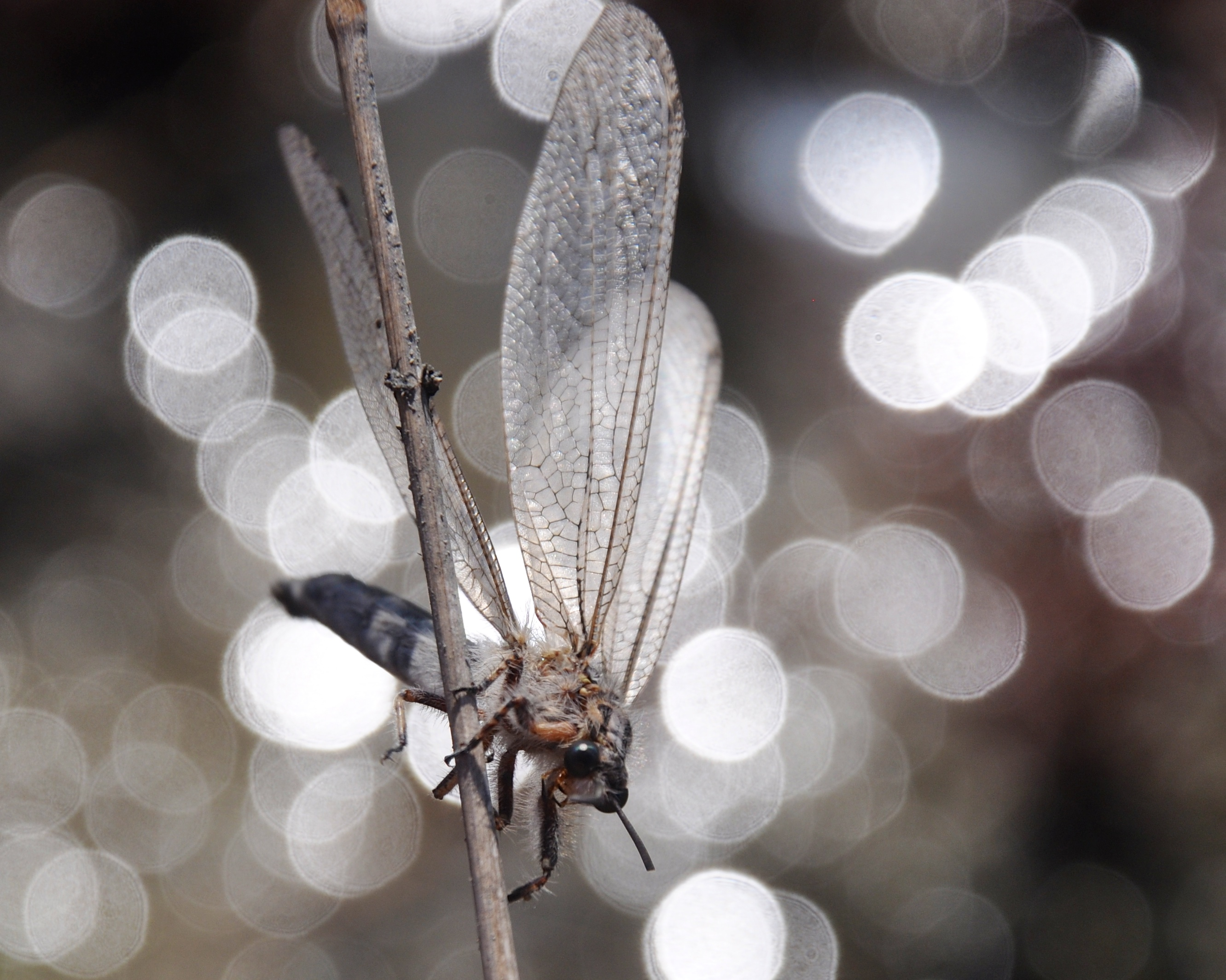 Муравьиный лев большой Acanthaclisis occitanica (Villers, 1789). Побережье озера Чокрак, Керчь, Крым, Украина